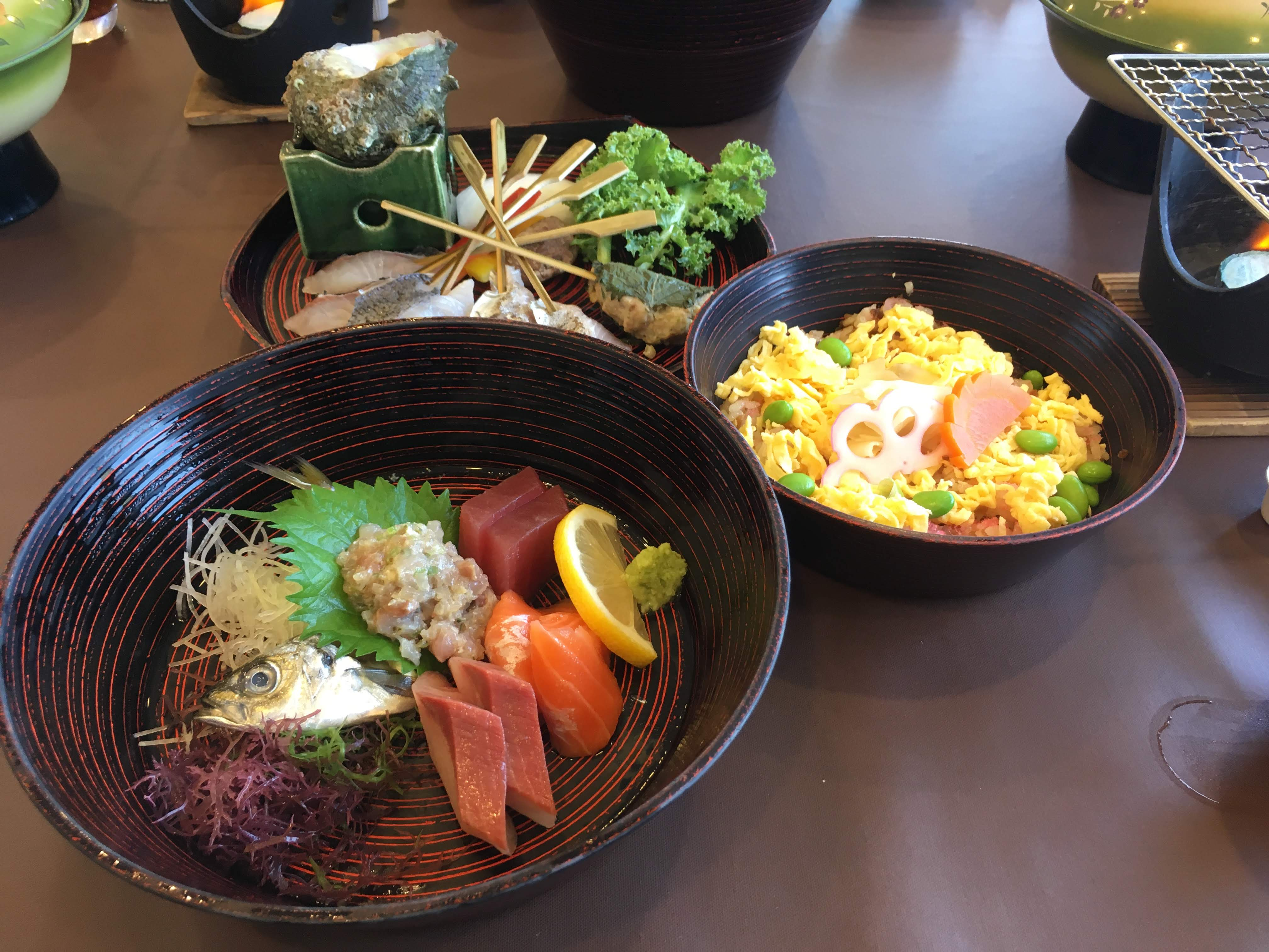 千葉県館山市のご当地グルメである、休暇村館山 レストランの館山炙り海鮮丼です。